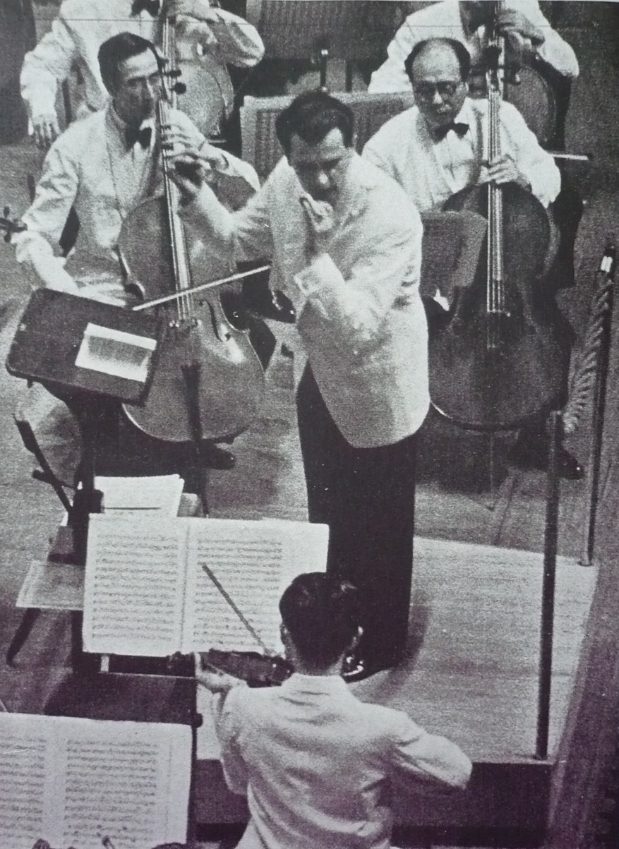 神奈川県立音楽堂で東京交響楽団を指揮するエドゥアルト・シュトラウス2世。